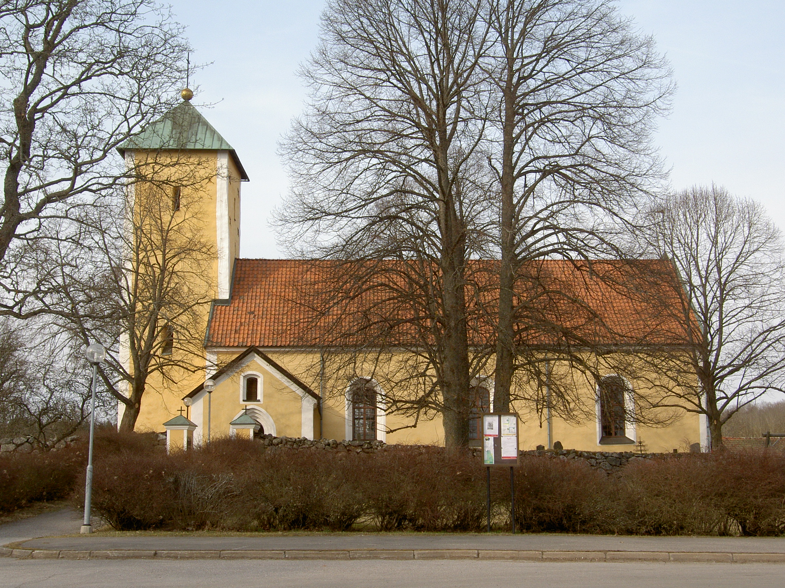 Odensala kyrka sedd söderifrån vid parkeringen